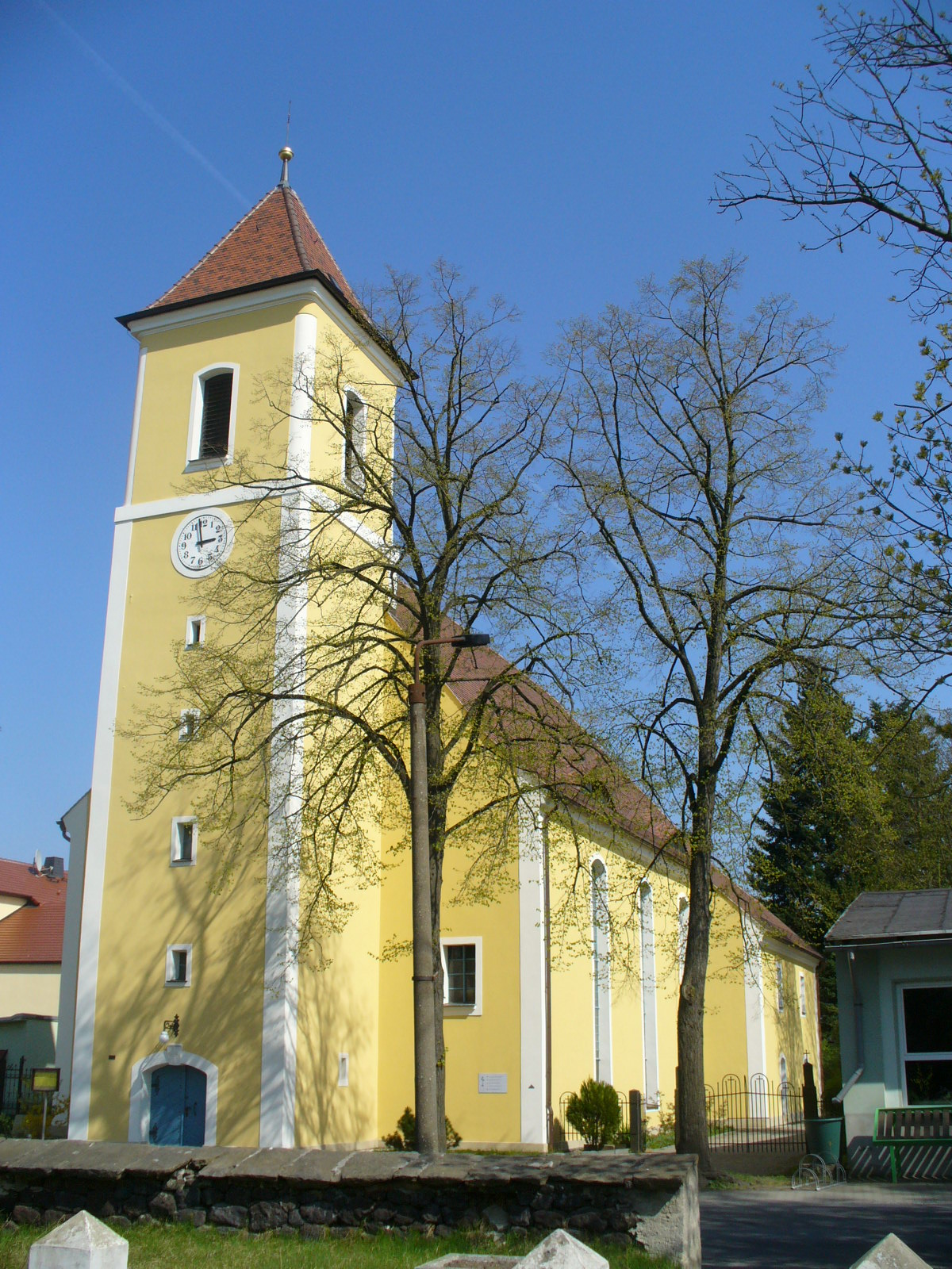 Lohsa.